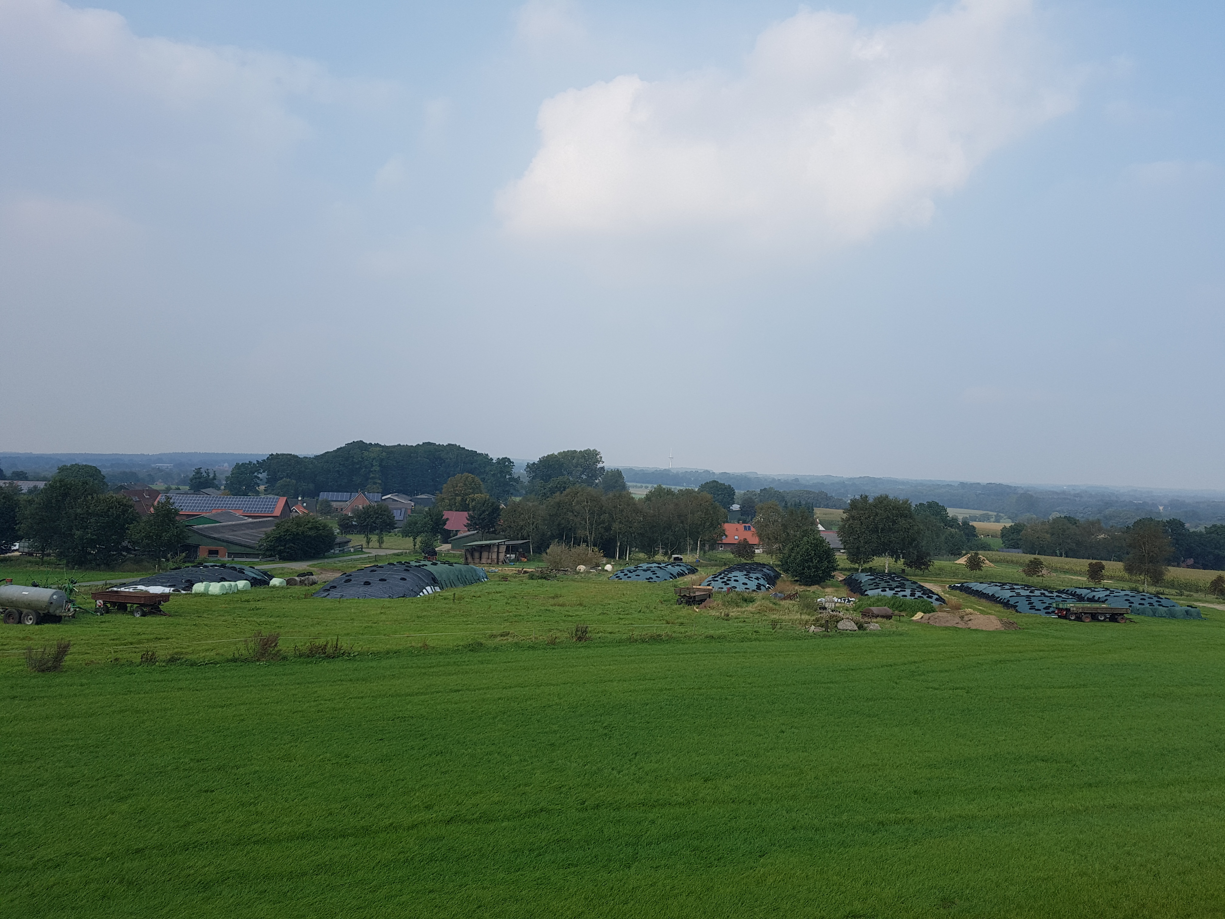 Blick von’n Bullenbarg bi Nindörp